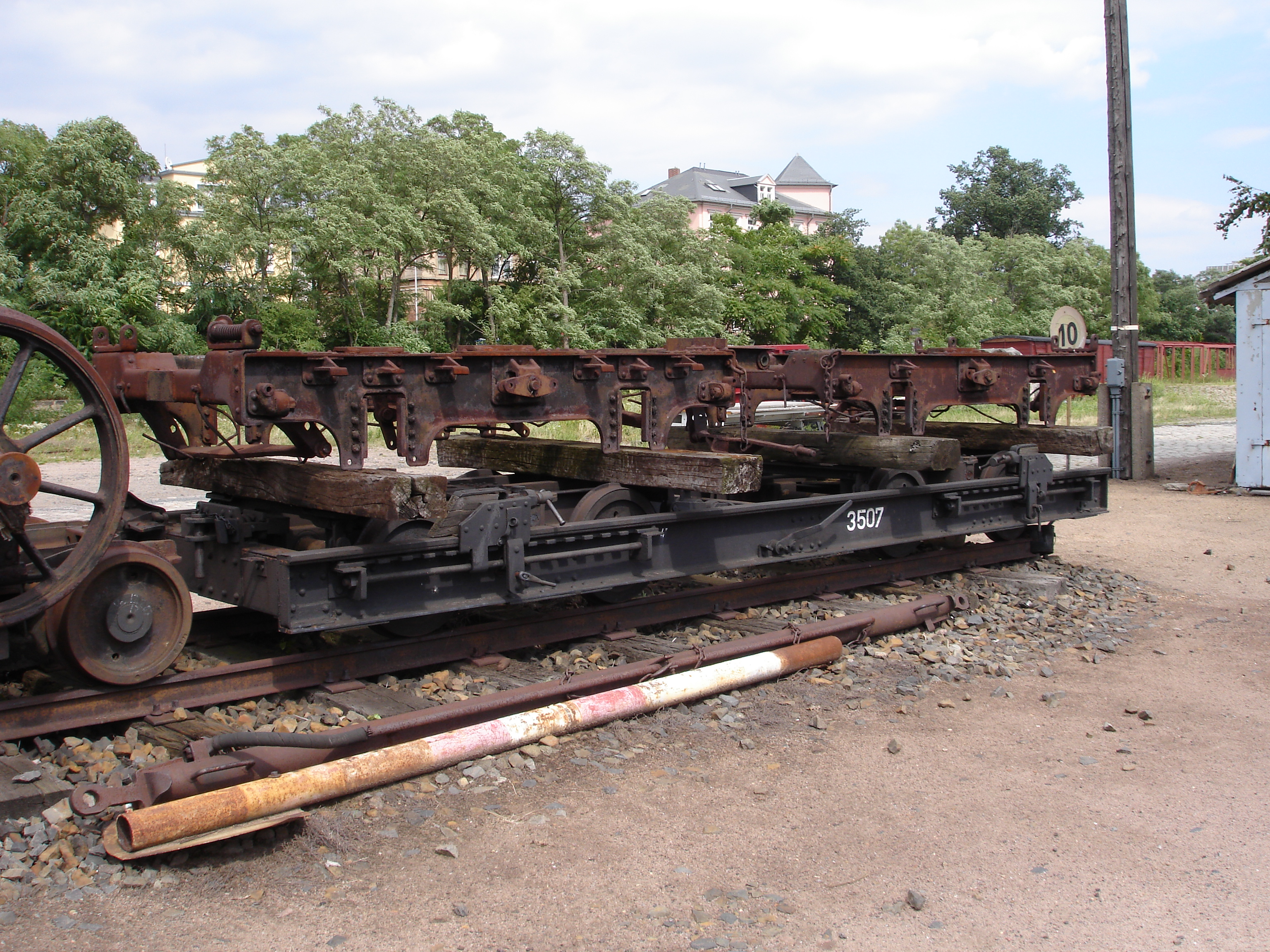 Rollwagen der ehemaligen Güterbahn Deuben in Radebeul